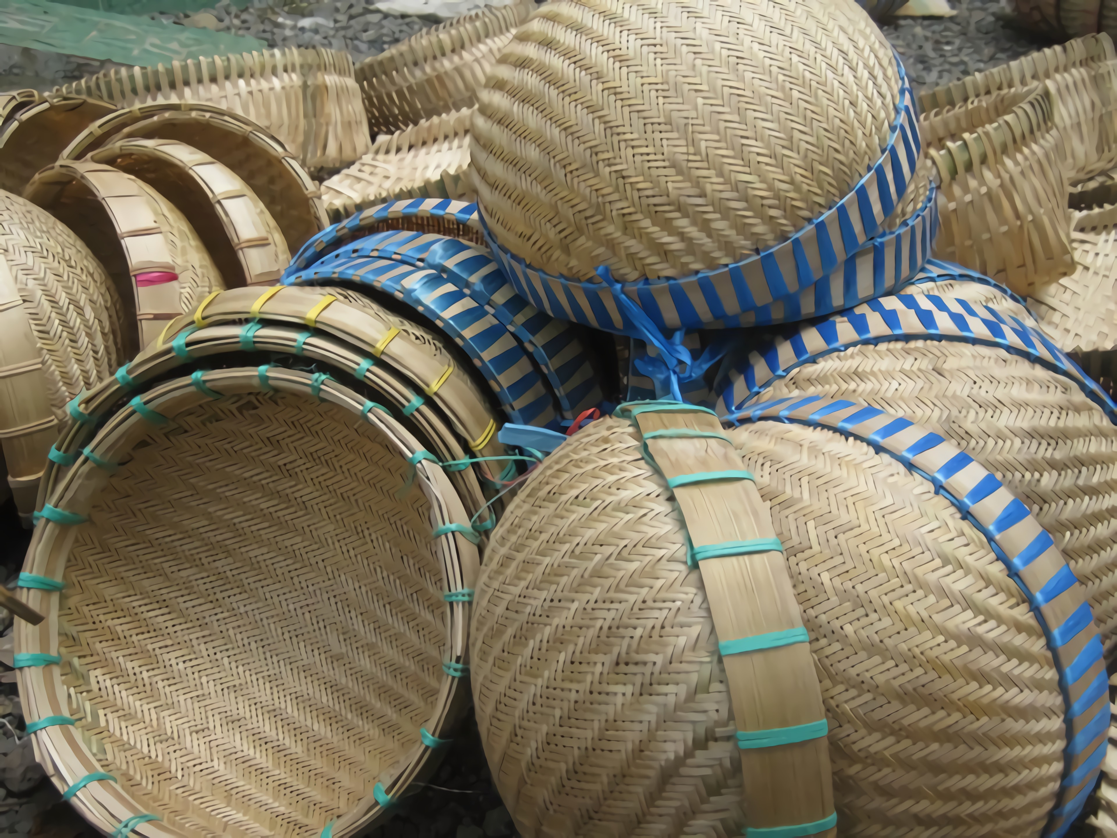 Kerajinan Kalo dari desa Sidigede, Welahan, Jepara